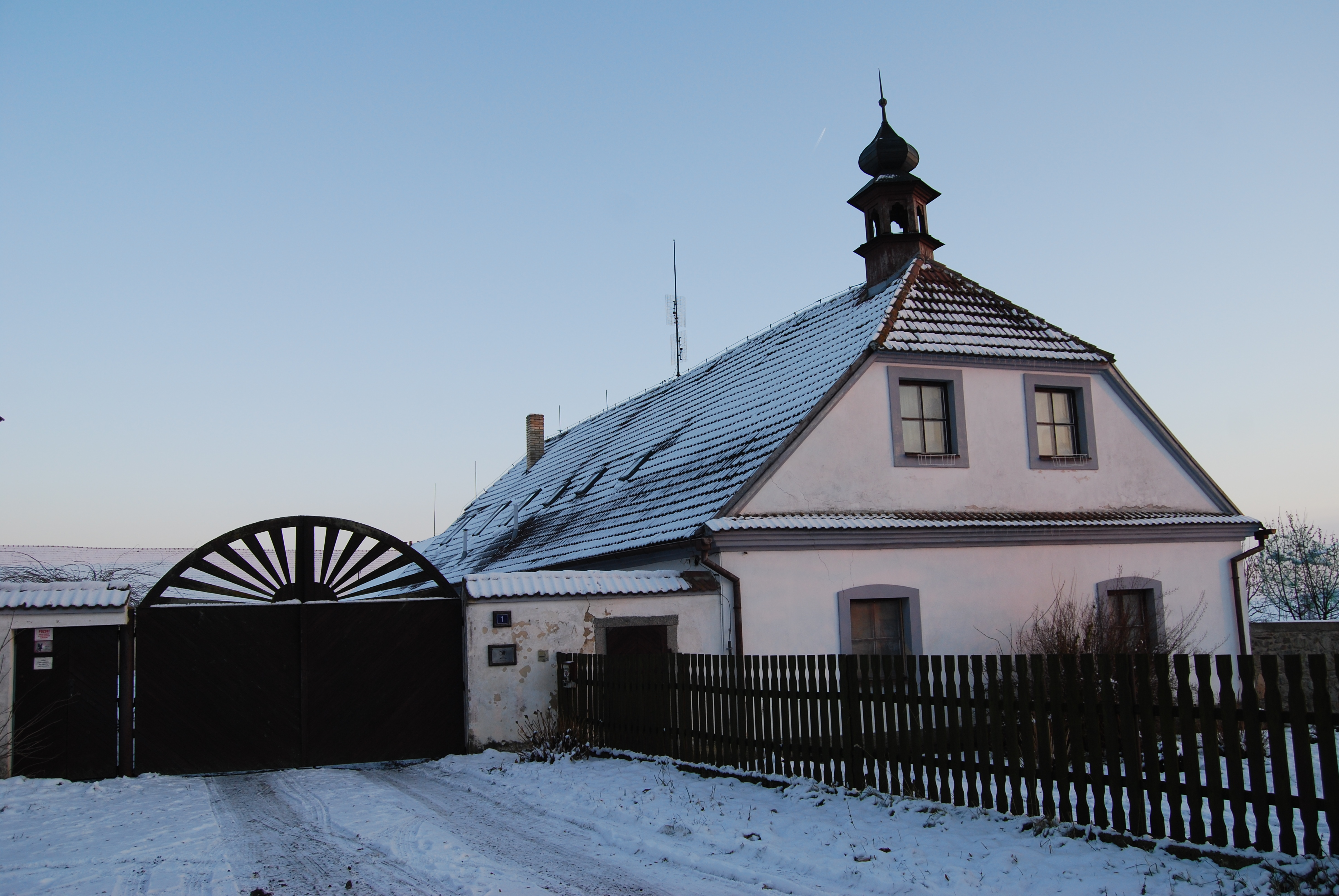 Stavení v obci. Řeteč je část města Mirovice v okrese Písek. Česká republika.